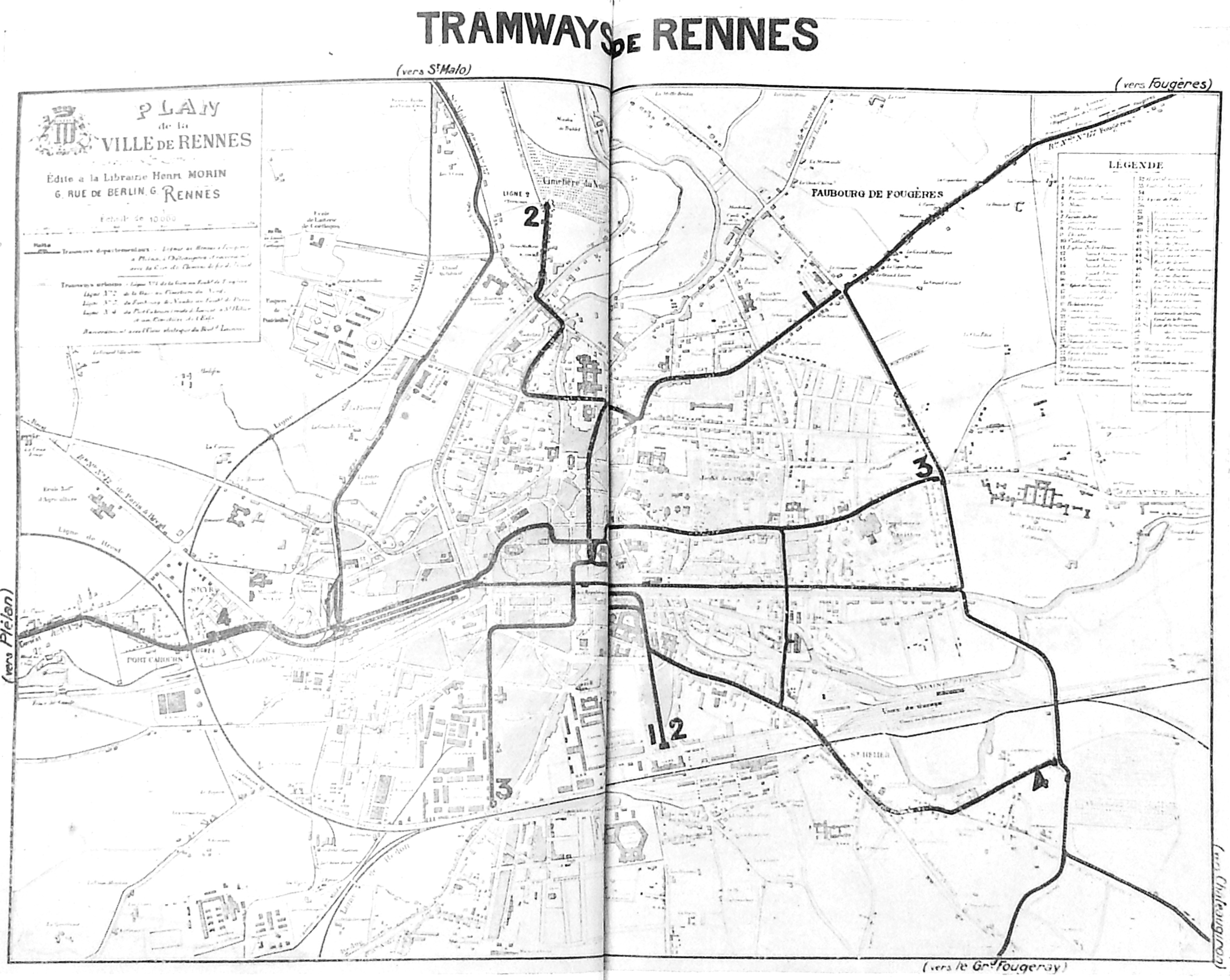 Plan du réseau des tramways de Rennes en 1928